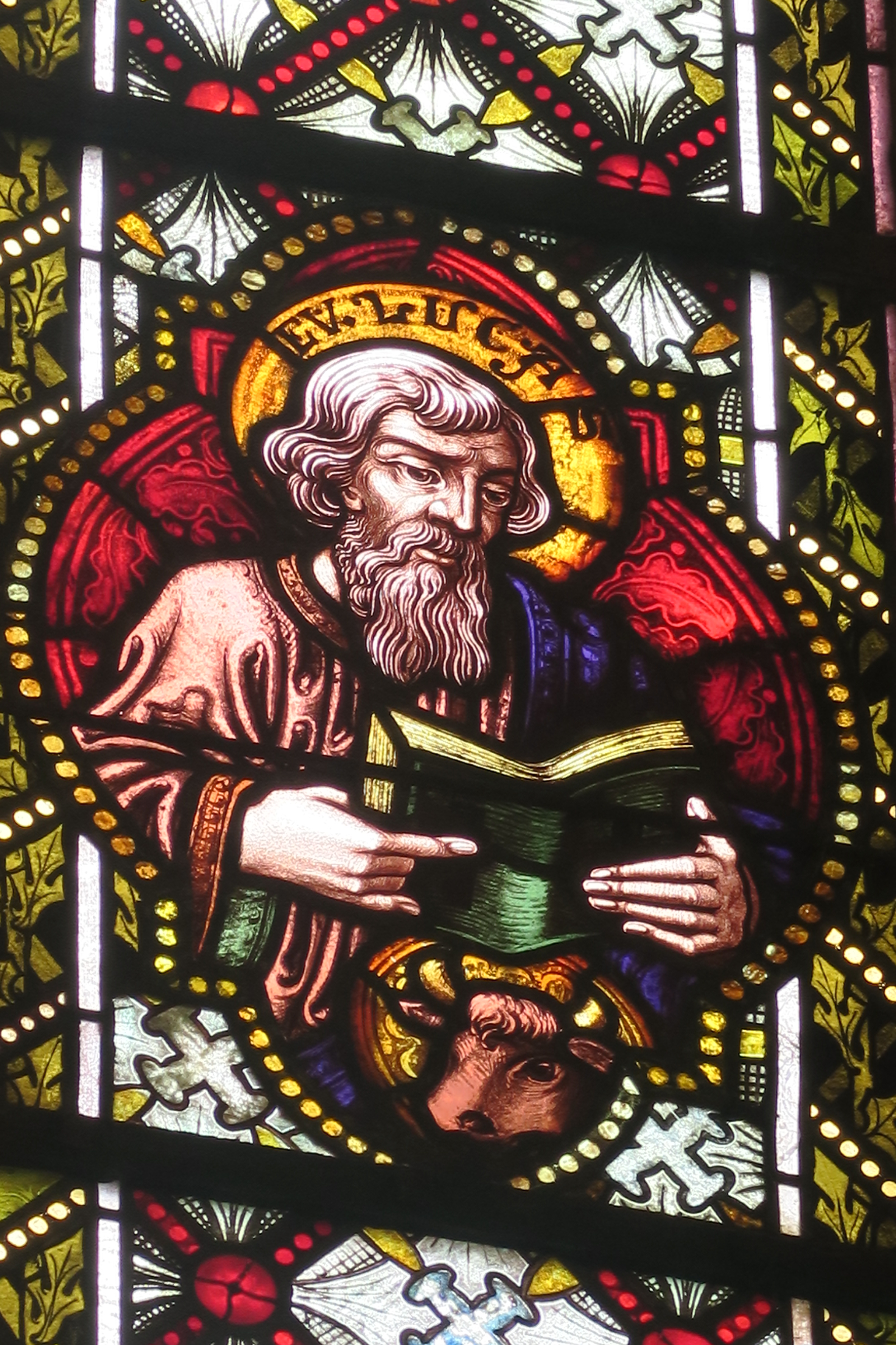 Buntglasfenster, mit Motiv Evangelist Lukas